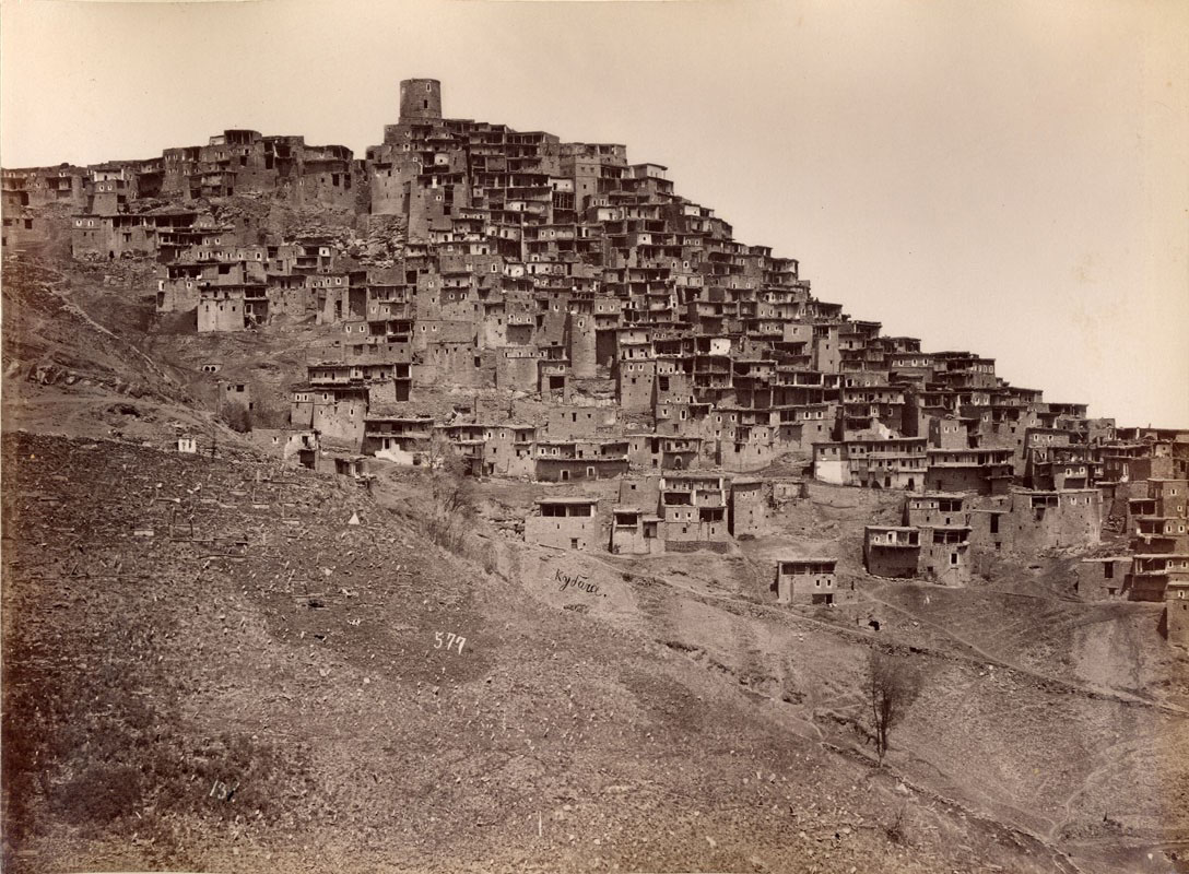 სოფელი კუბაჩი. გადაღების თარიღი უცნობია.